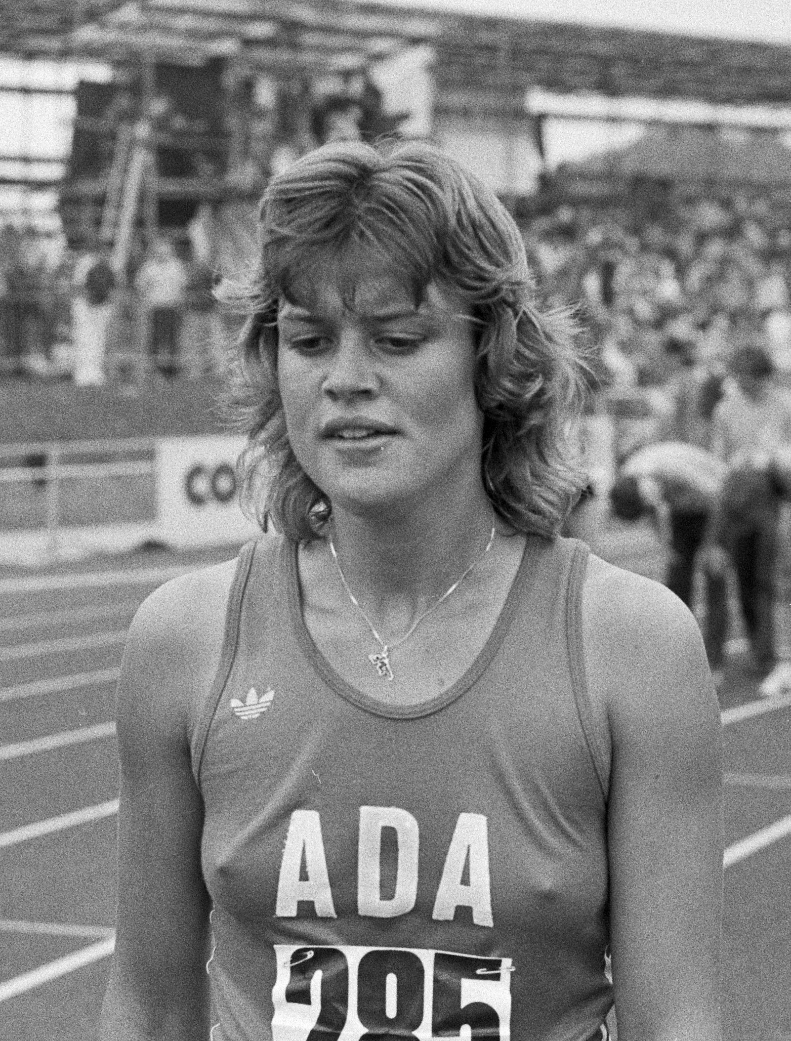 Nederlandse kampioenschappen atletiek te Utrecht: Olga Commandeur, winnares op de 400m horden.